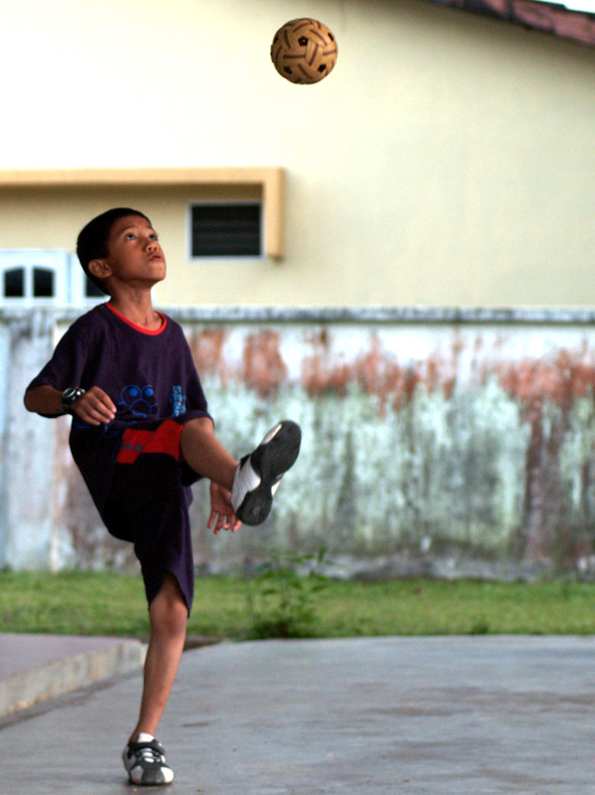 Boy playing Sepak Takraw